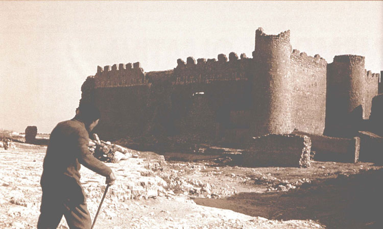 Laguna - Urueña (Valladolid) - Fotografía B/N